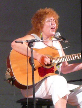 Big Mama al Caixaforum